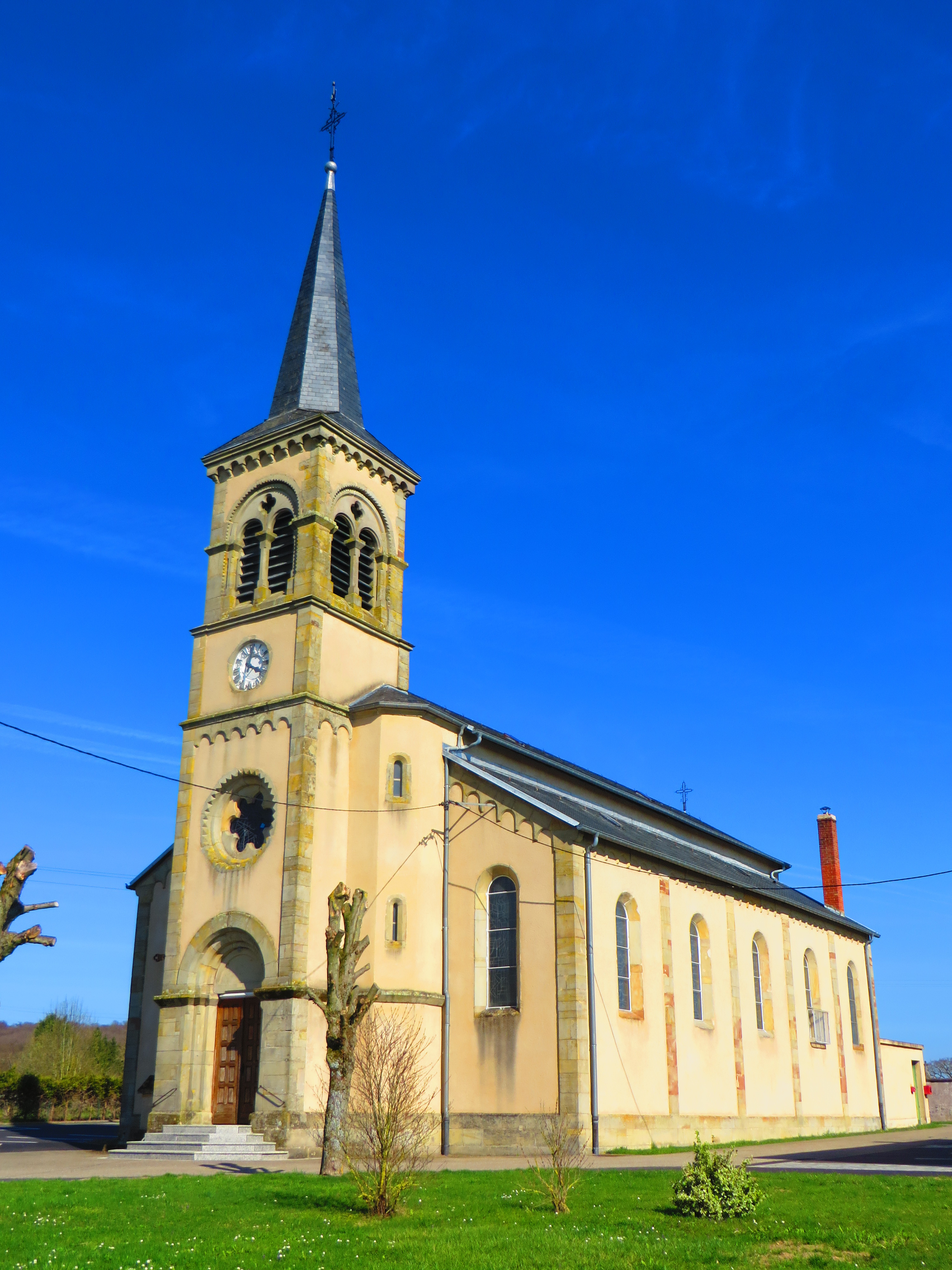 Frémestroff Église Saint-Joseph